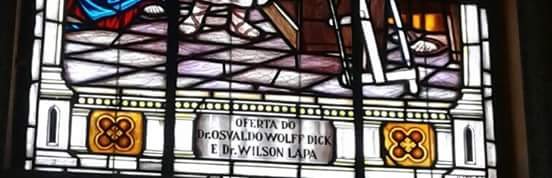 Detalhe do vitral da Igreja Nosso Senhor do Bonfim de Braço do Norte, oferecido pelos médicos Oswaldo Wolff Dick e Vilson Lapa. Fotografia do bioquímico Roberto Pereira, Laboratório Santa Augusta, Braço do Norte.